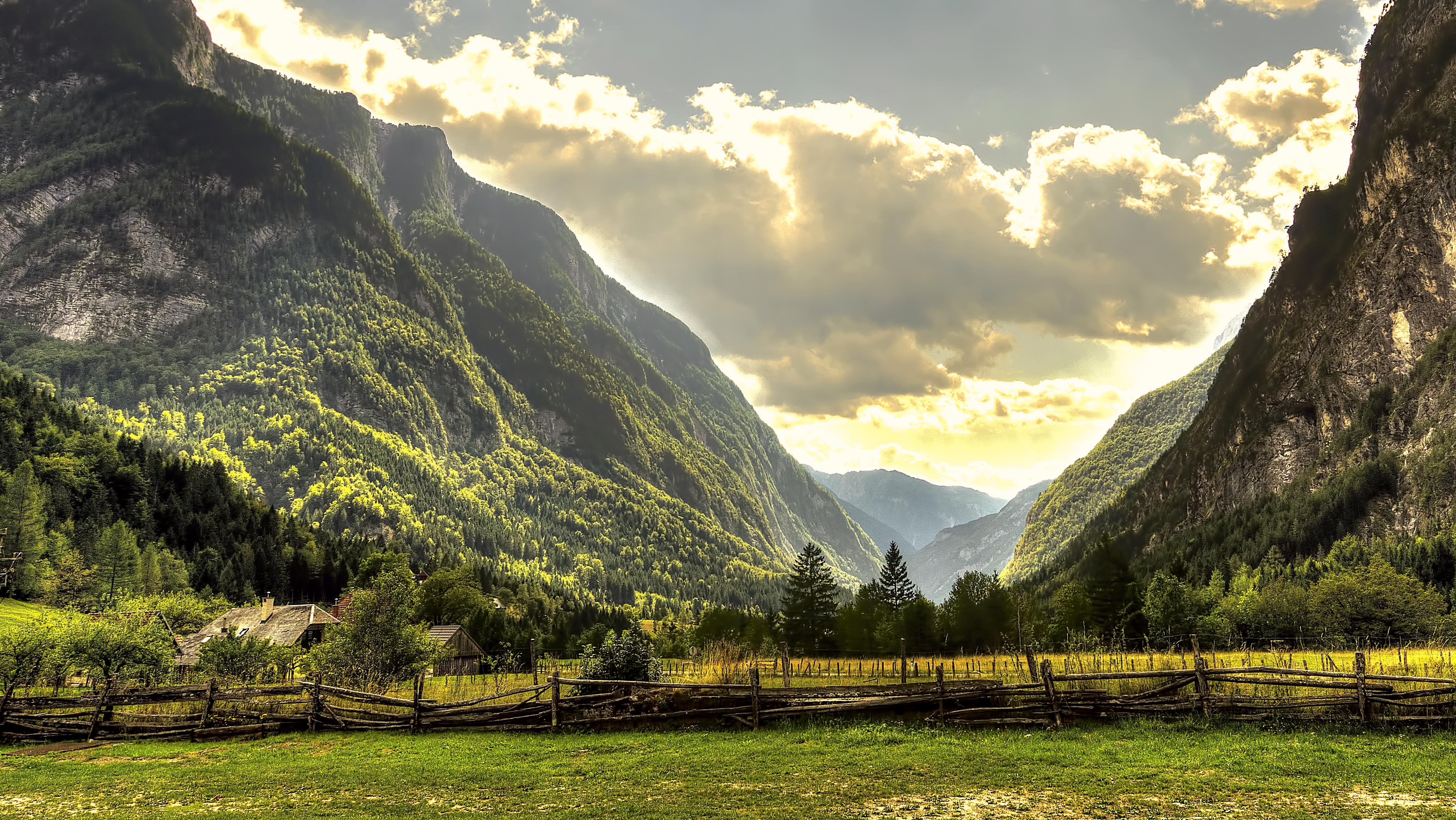 Valle del rio Soça, Eslovenia.